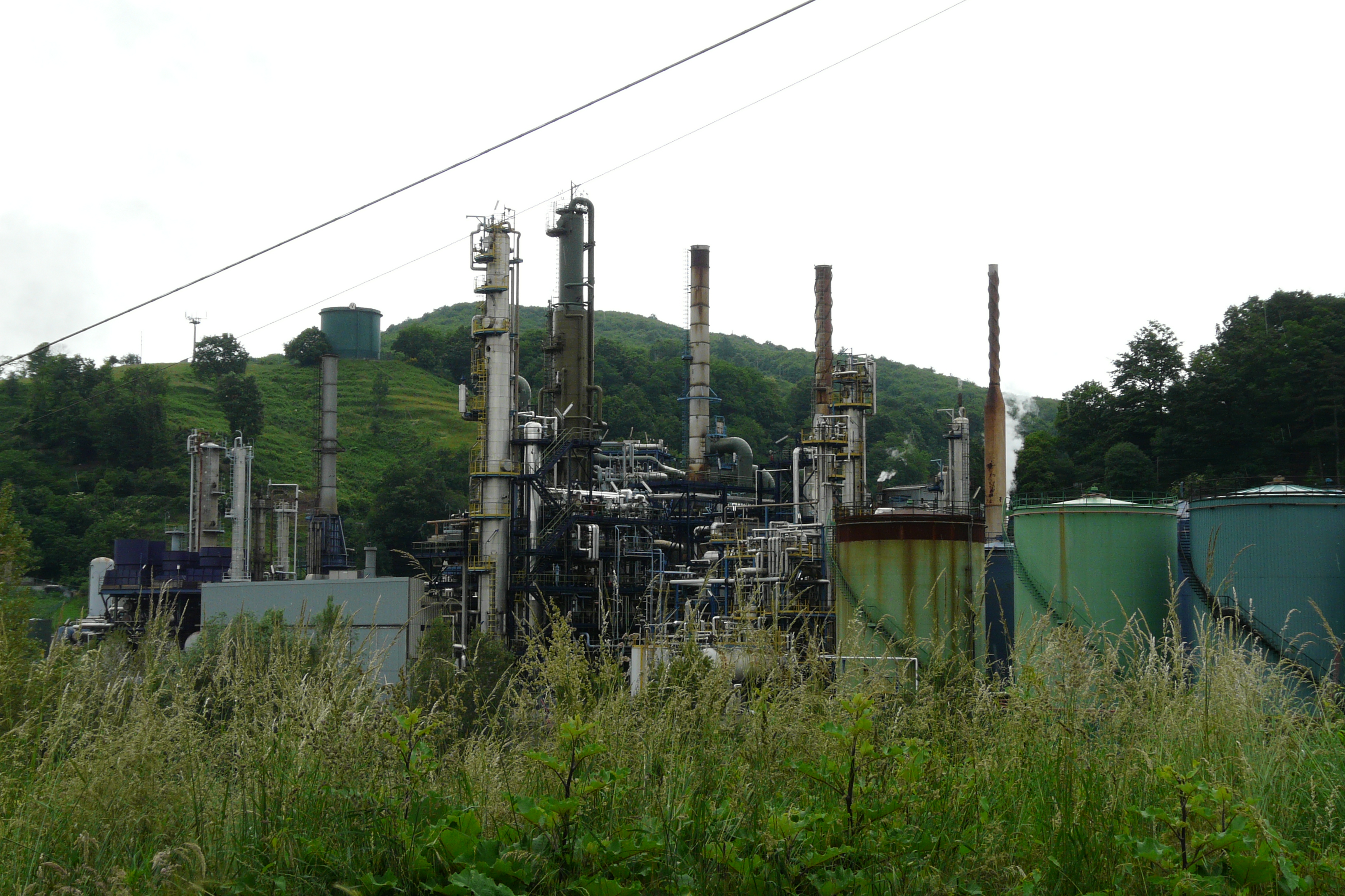 Raffineria di petrolio IPLOM presso Busalla, Liguria, Italia